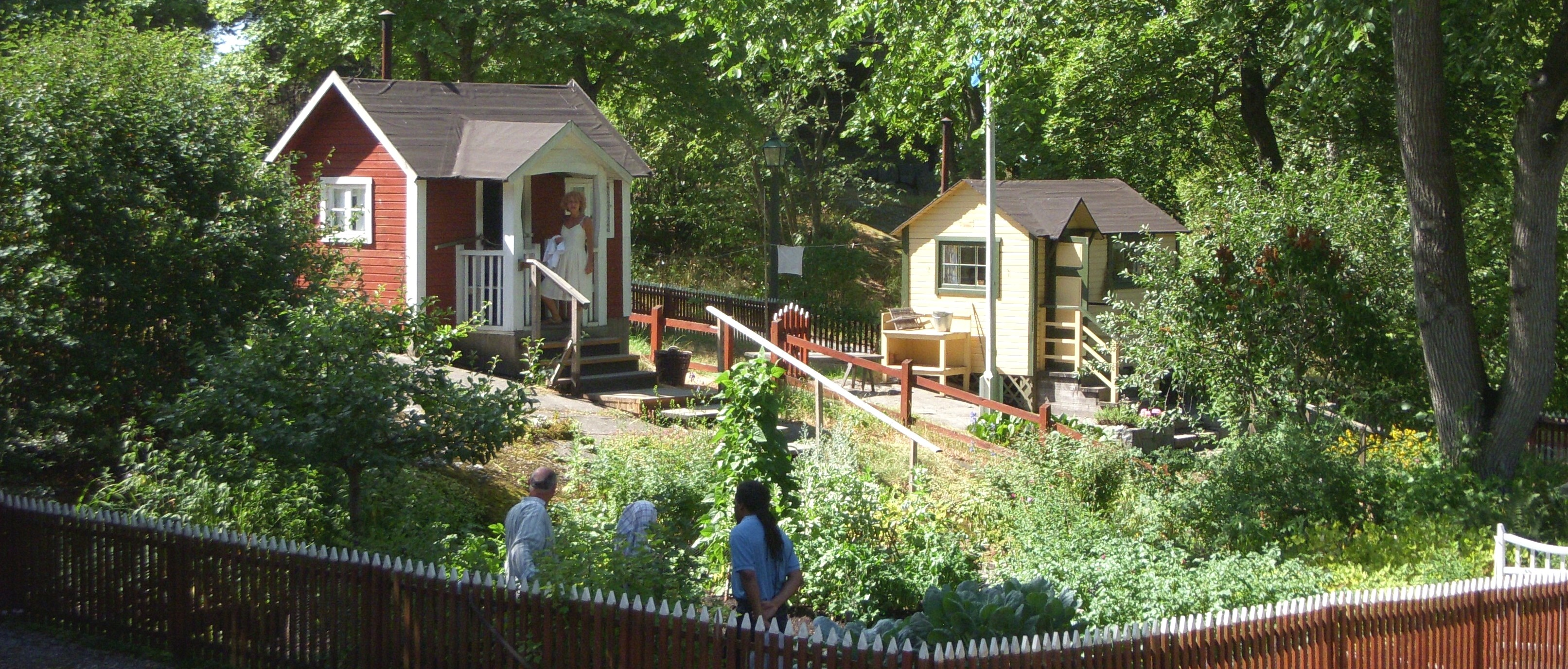 Skansens koloniträdgård